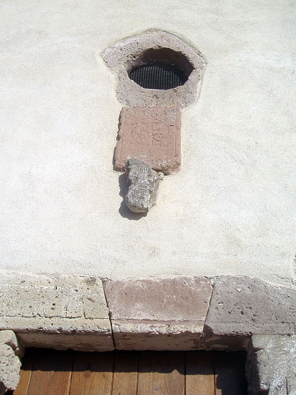 Villarios, frazione di Giba: stemma Dei Benedettini presente sulla facciata della chiesa di Santa Marta.